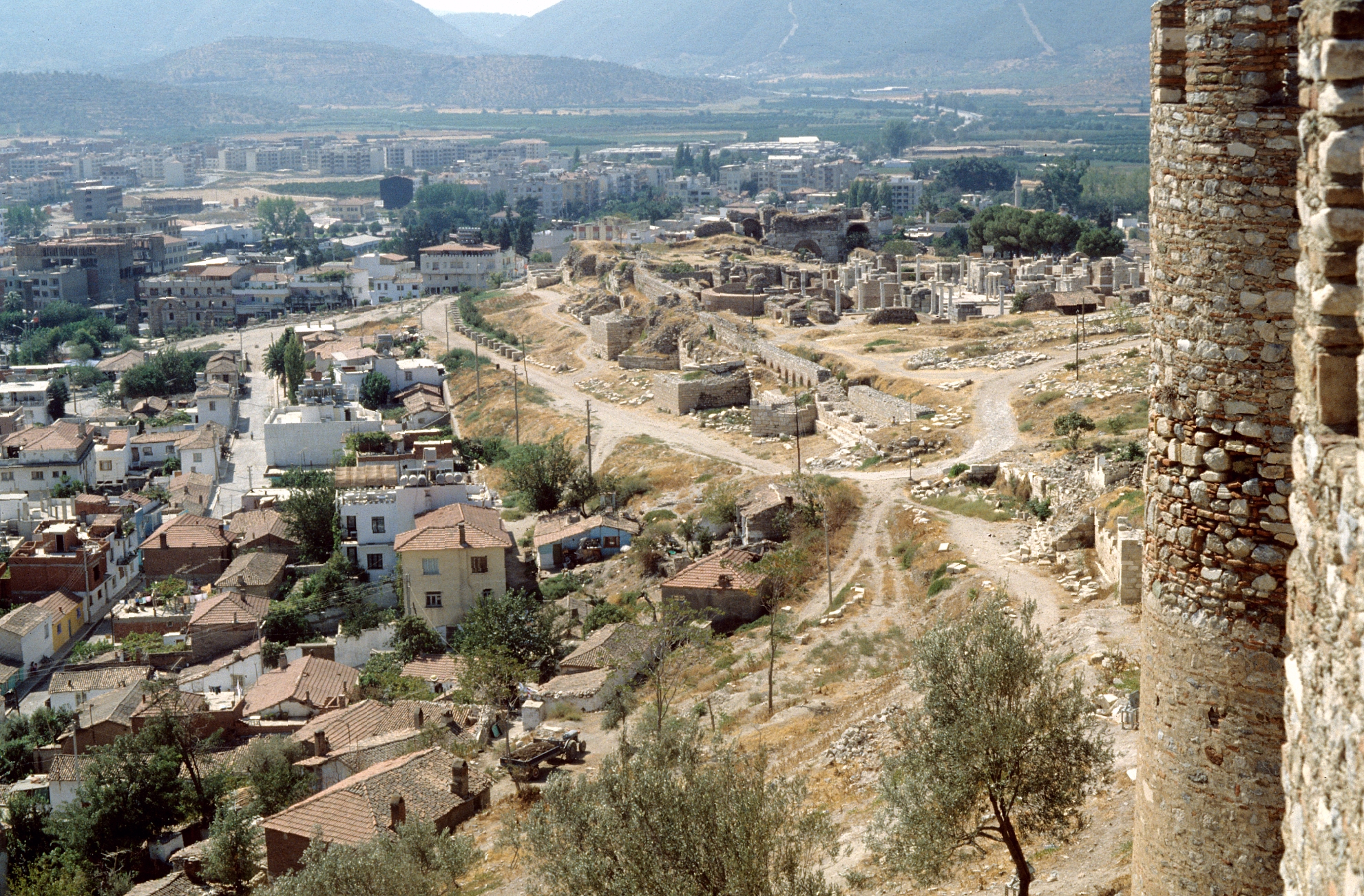 Blick auf Selçuk (Westtürkei) von der Zitadelle